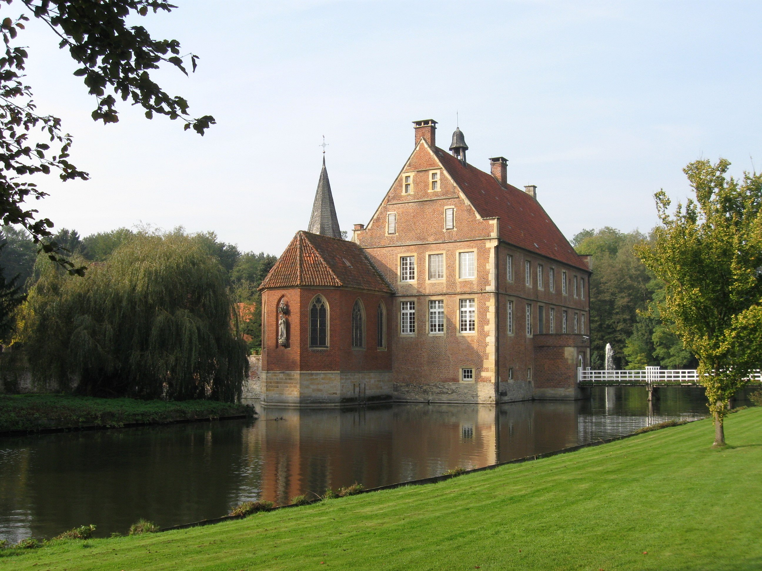 Burg Hülshoff, Havixbeck, Geburtshaus der Dichterin Annette von Droste-Hülshoff